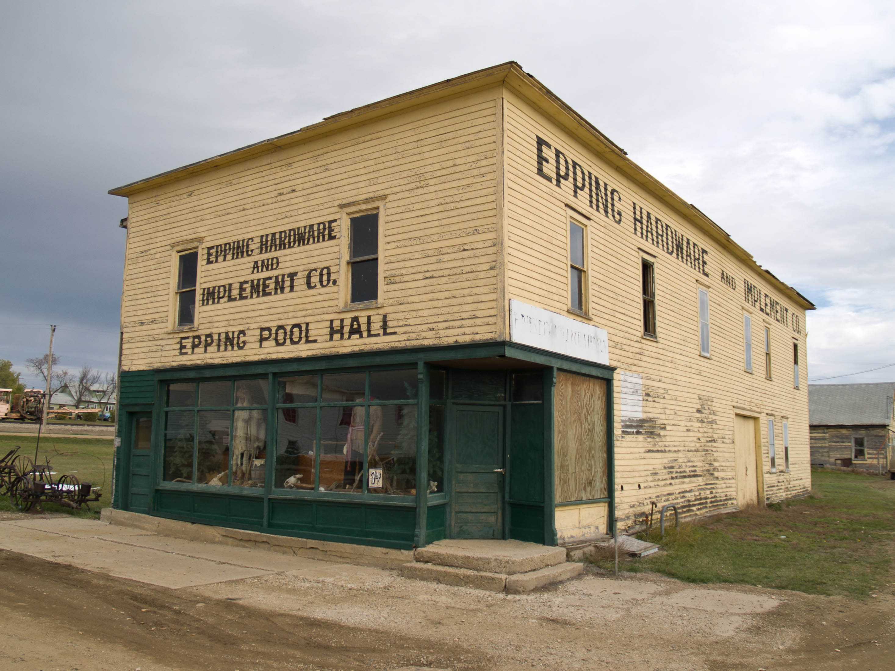 Epping Hardware - Epping, North Dakota